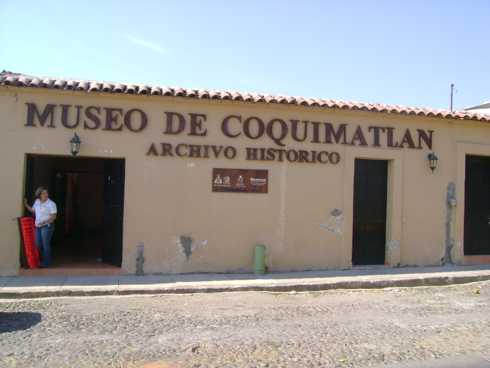 Museo de Coquimatlan, Colima.